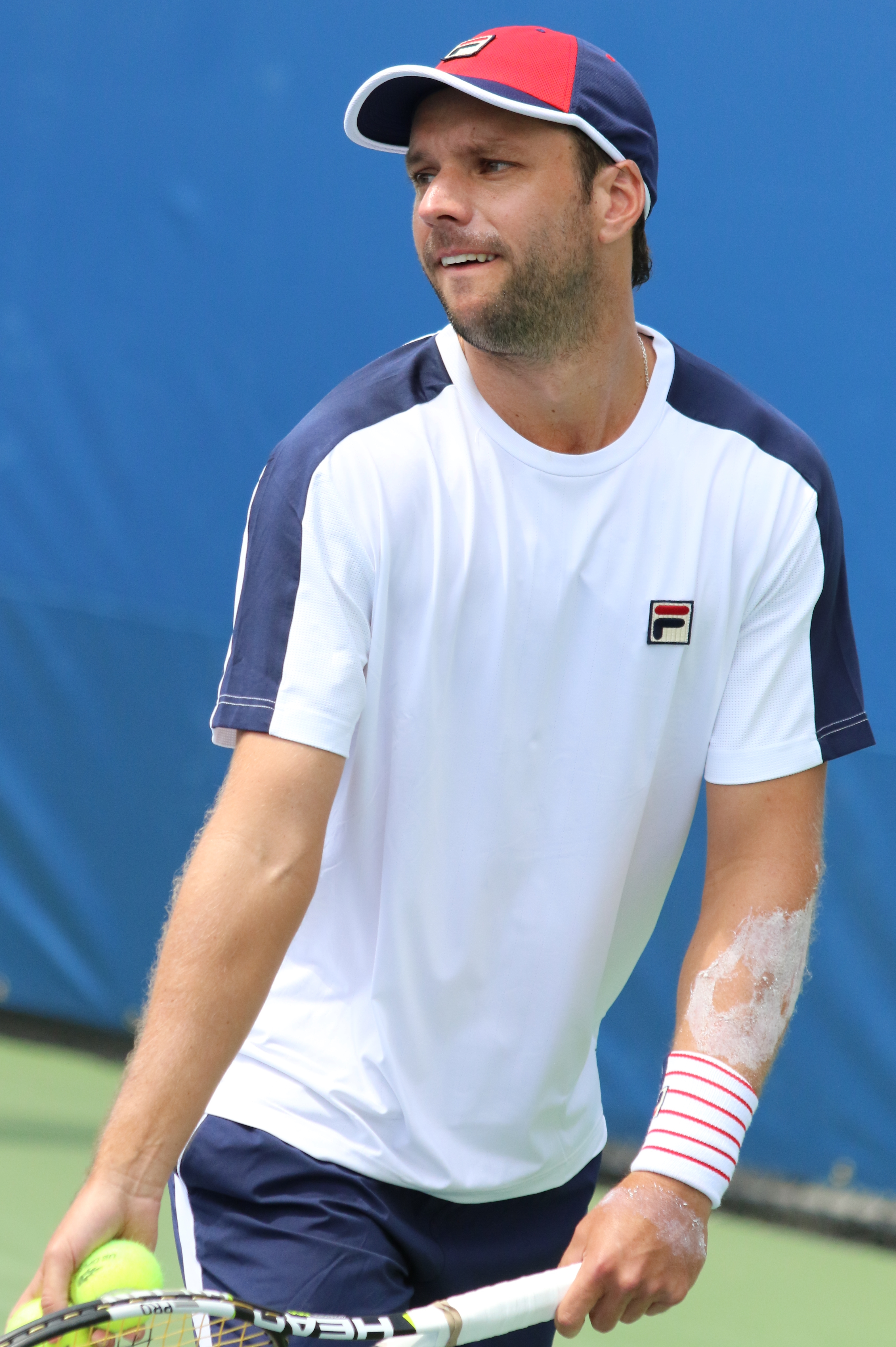 Zeballos US16 (28)